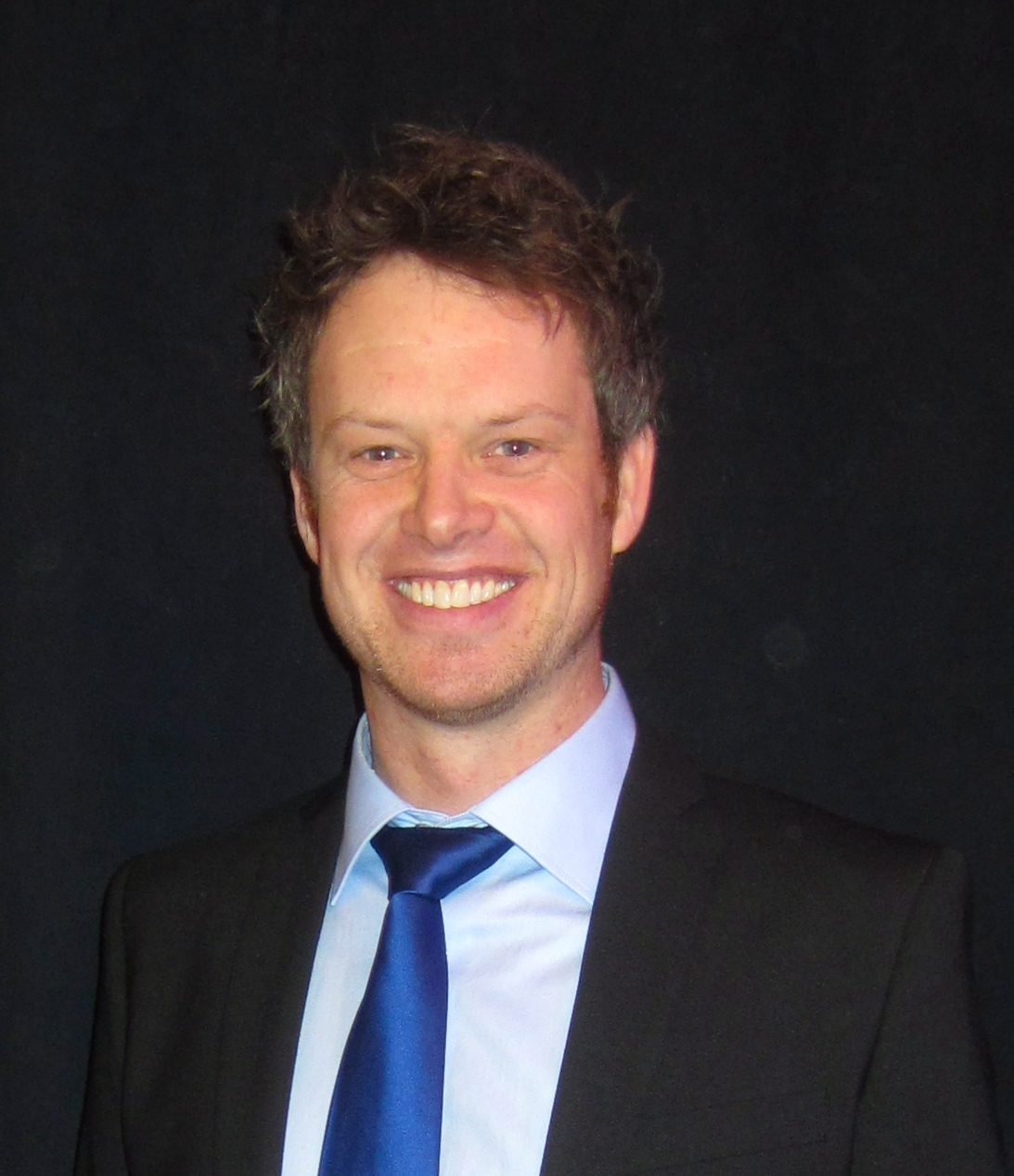 Joachim Bäckström, svensk operasångare